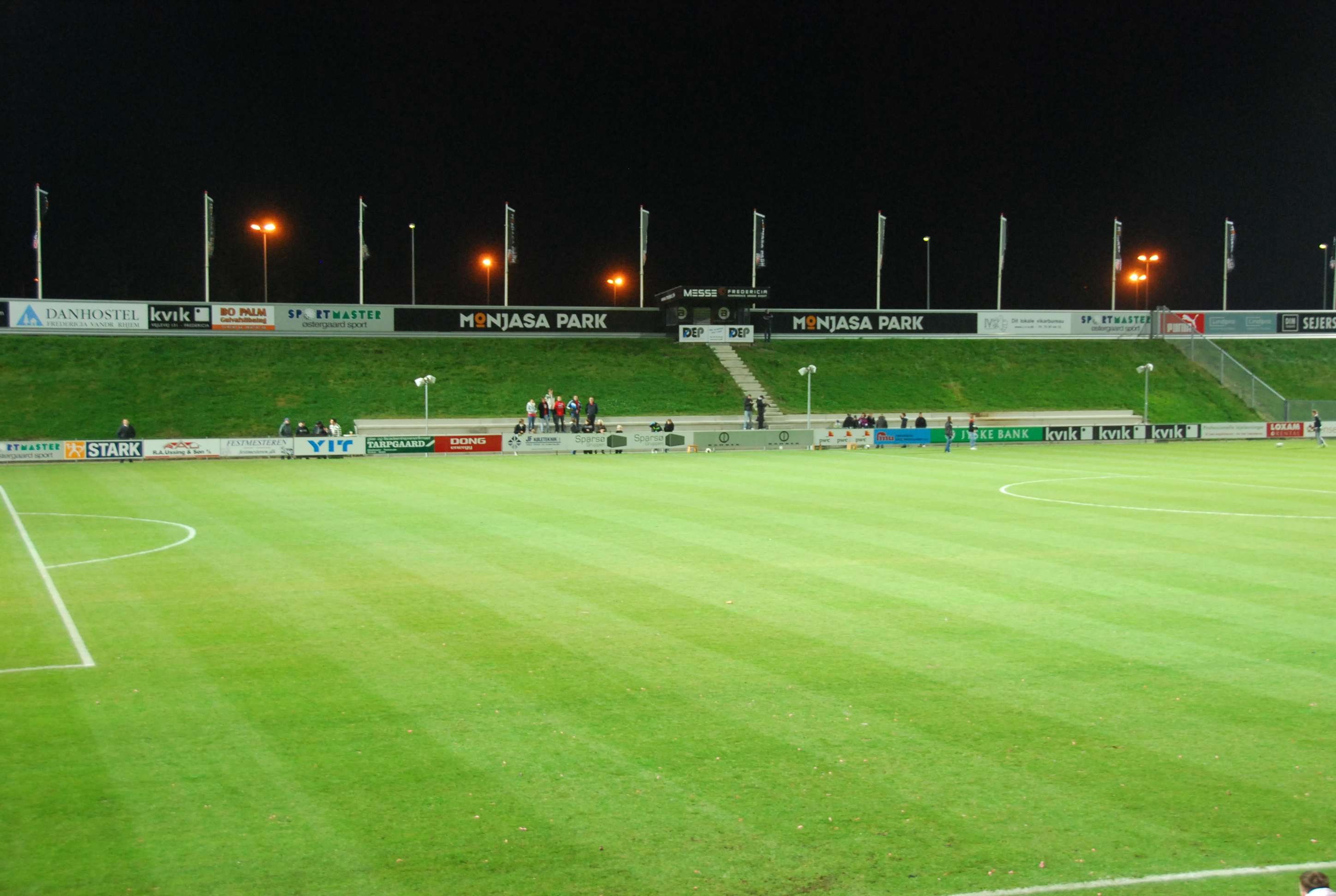 Monjasa Park før 1. divisionskampen imellem FC Fredericia og Viborg FF.